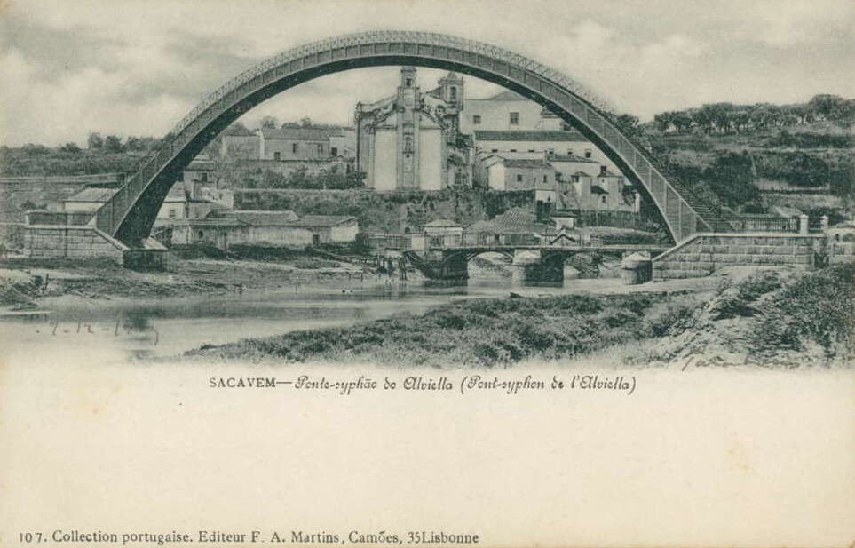 Sifón de Sacavém (Portugal) tras su inauguración en 1880.